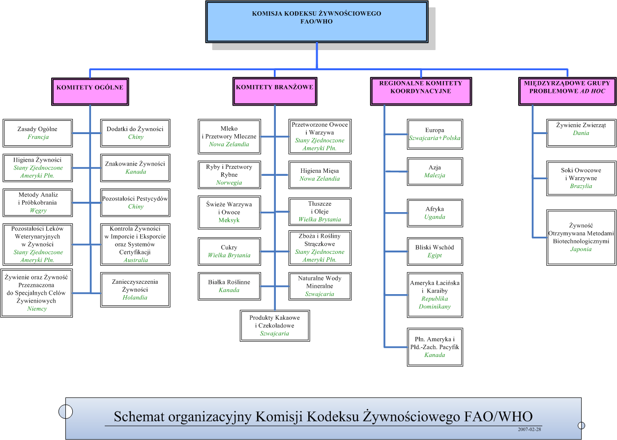 Schemat organizacyjny Komisji KOdeksu Żywnościowego FAO/WHO, Marta Sobieraj, 30.01.2007 r.